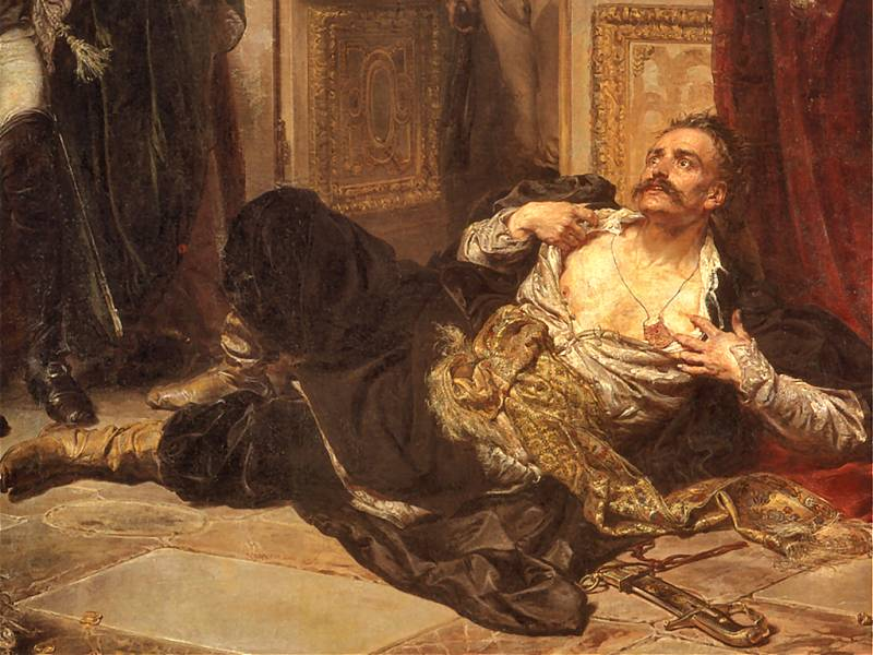 Беларуская (тарашкевіца): Тадэвуш Рэйтан, фрагмэнт карціны Яна Матэйкі